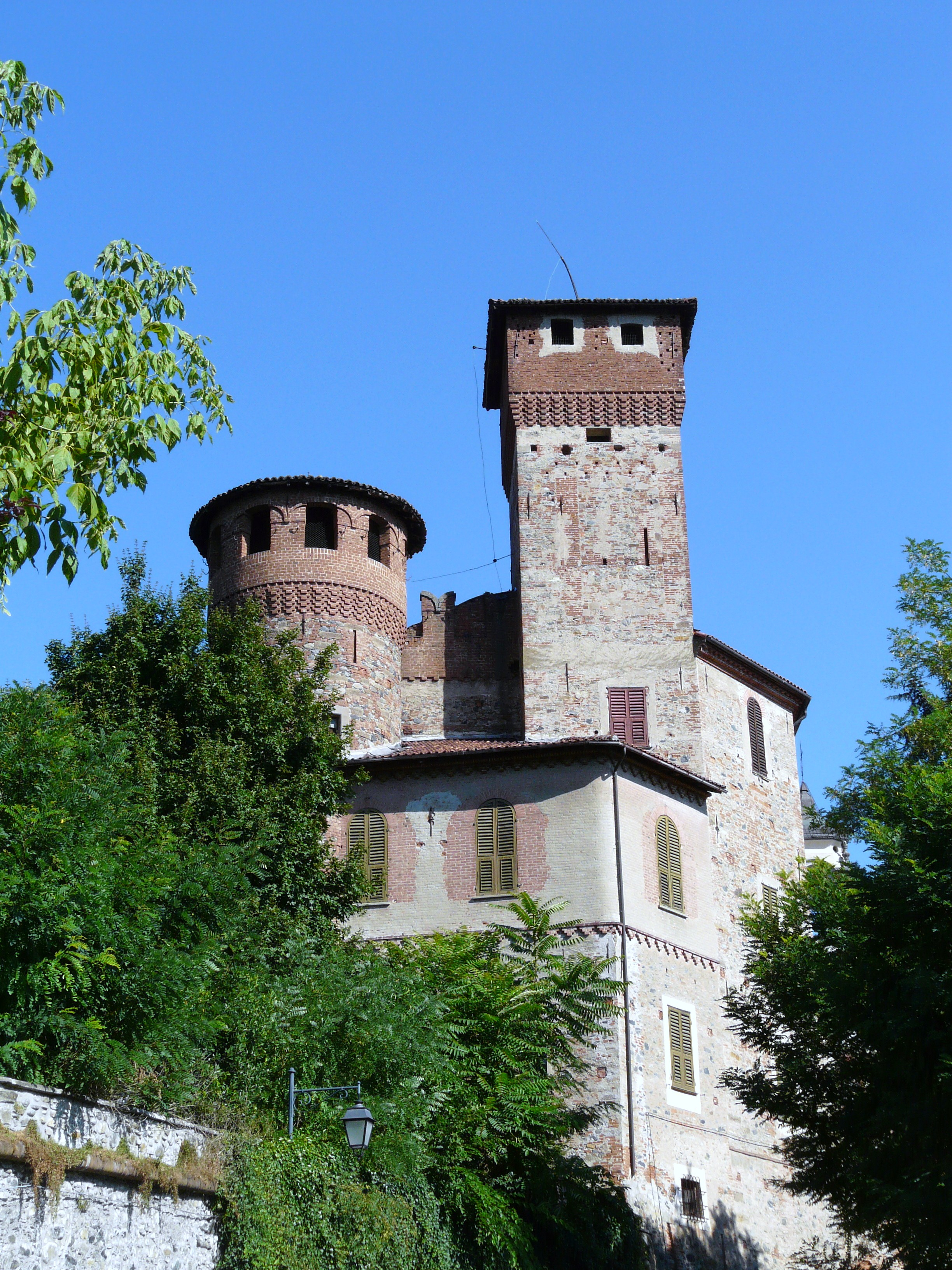 Castello Gajoli Boidi di Molare, Piemonte, Italia